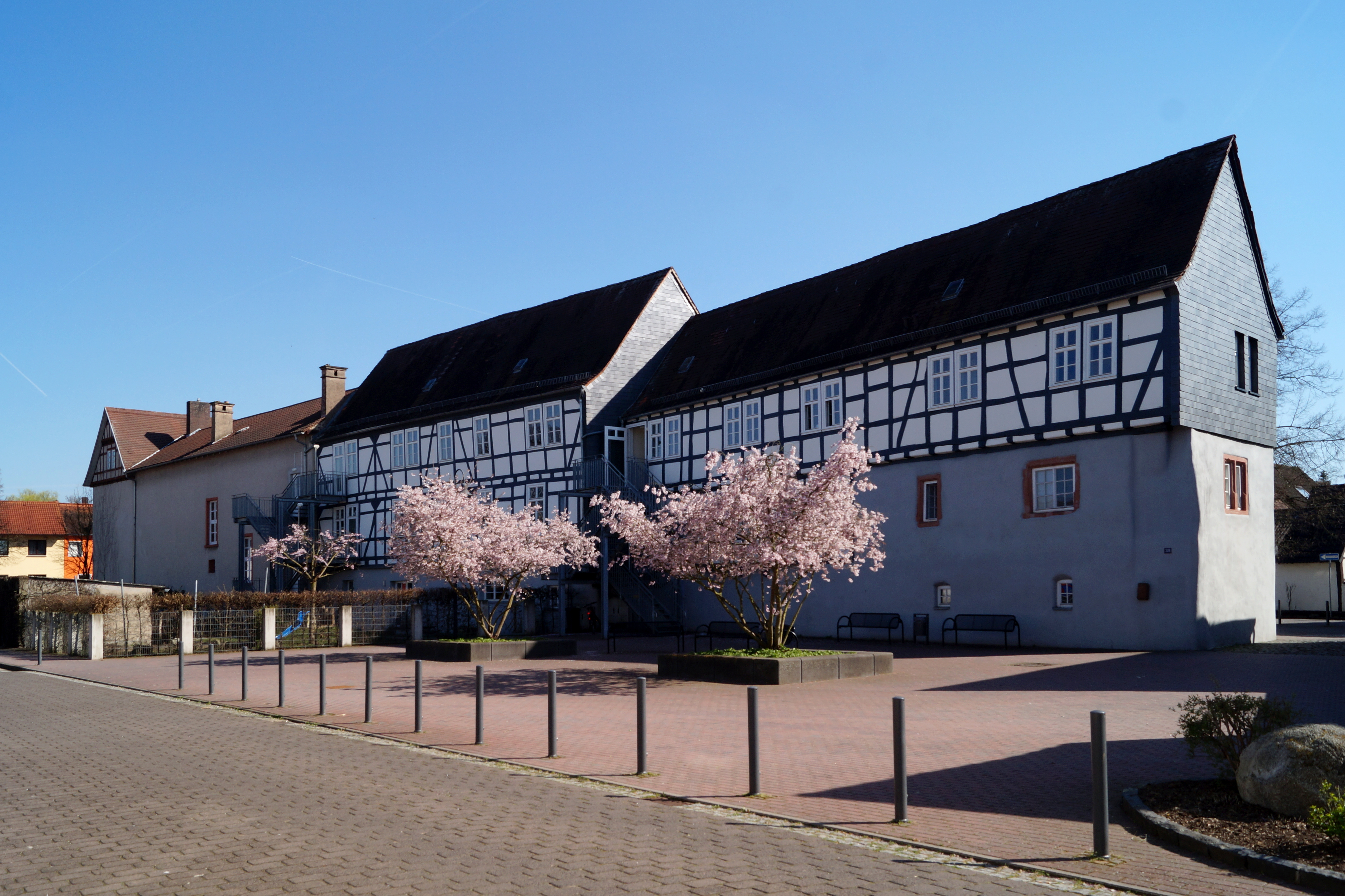 Sogenanntes Schloesschen in Rückingen, Stadt Erlensee in Hessen. Wohngebäude als Rest des ehemaligen Herrenhofs, Ansicht von der ehemaligen Außenseite.